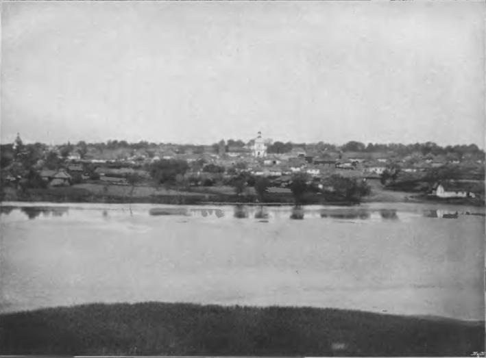 Вигляд Базалії.